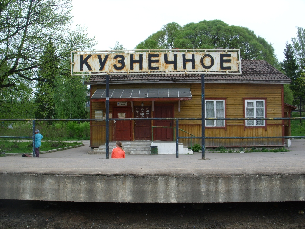 Указатель с названием станции